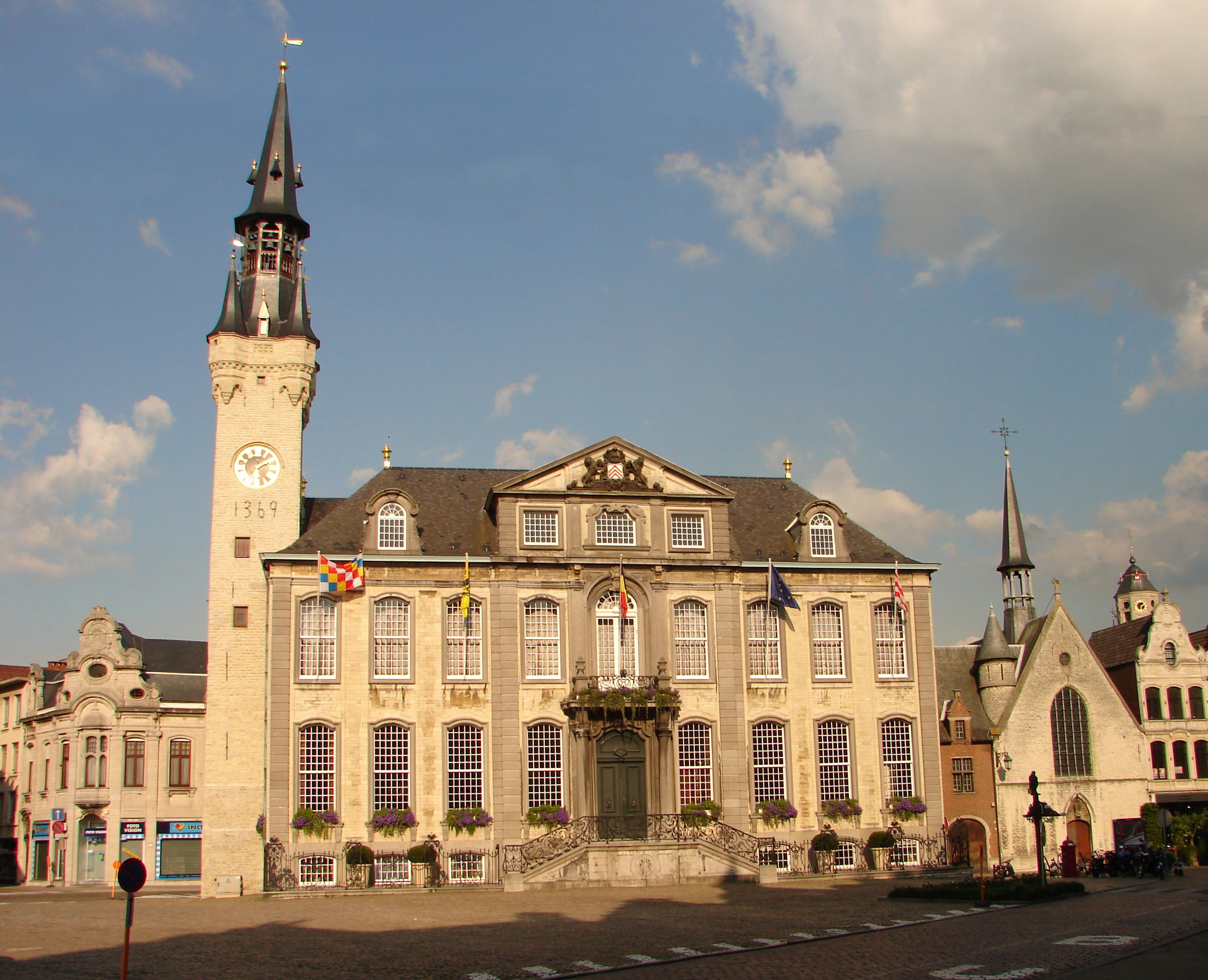 Voorzijde van het stadhuis van Lier met belforttoren